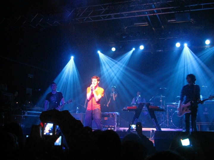 Lost live ai magazzini generali, Milano.